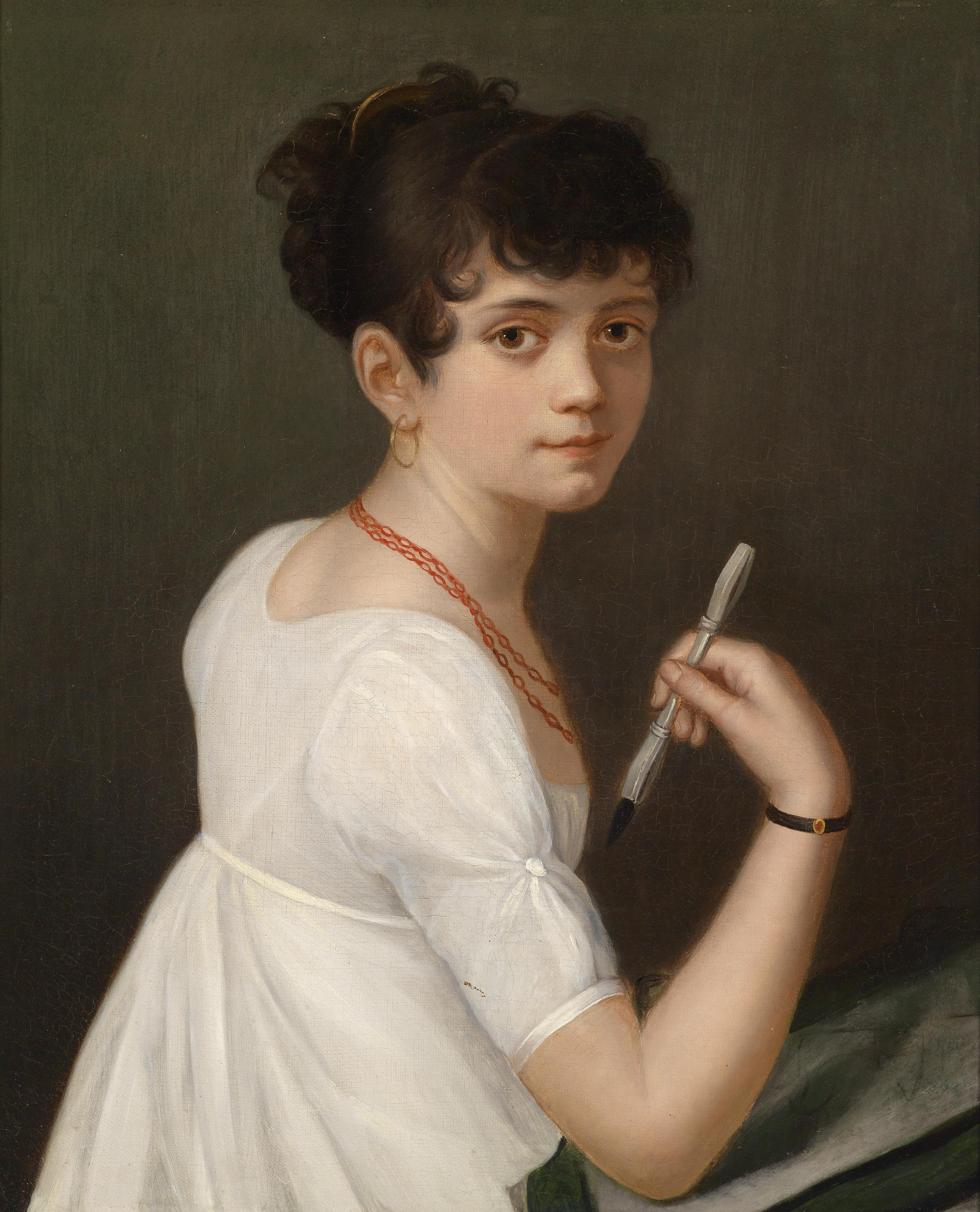 "Die schöne Künstlerin", französische Schule des späten 18. Jahrhunderts, Öl auf Leinwand, 60 x 49 cm, vermutlich von Schüler des Jacques Louis David